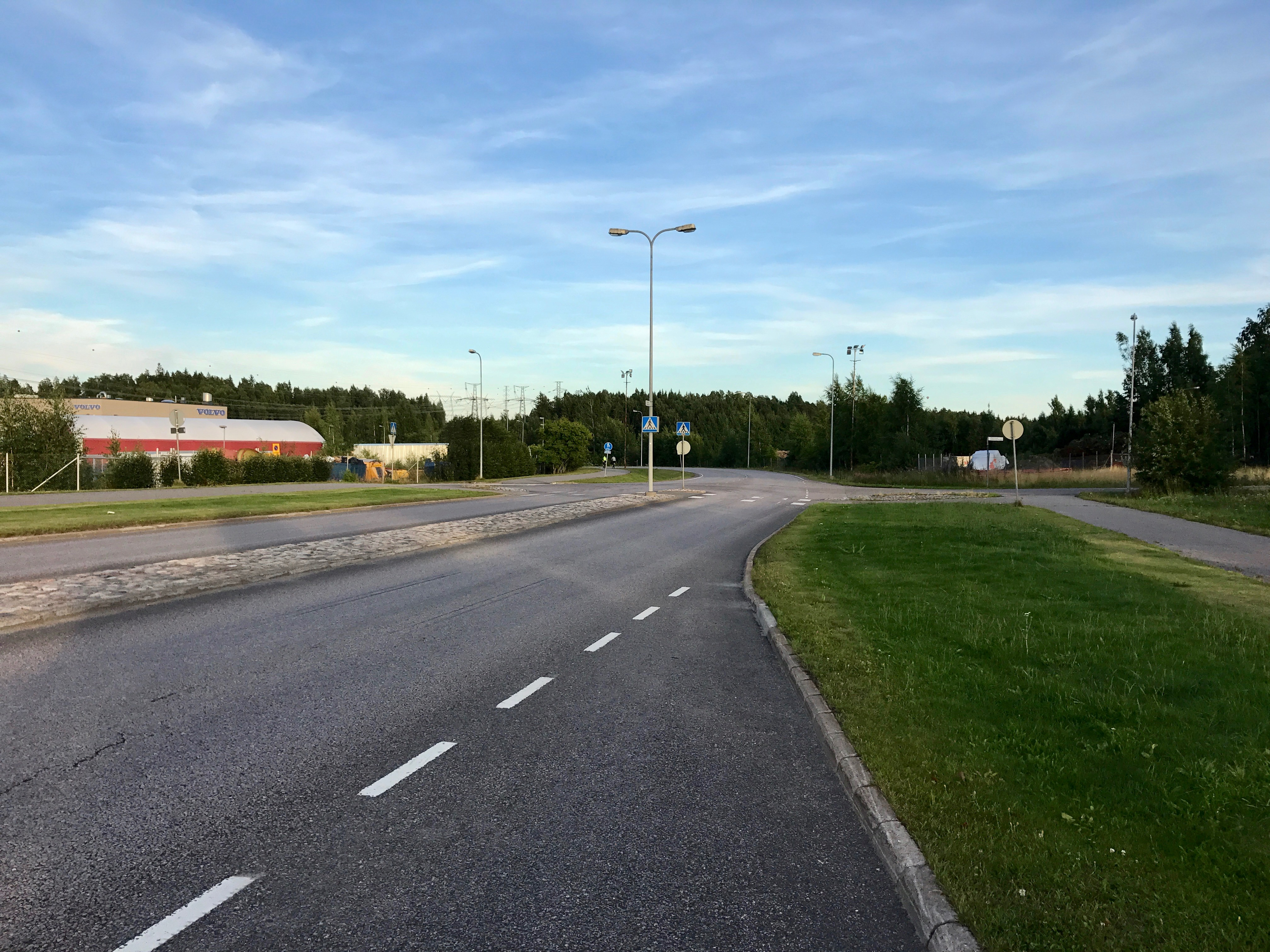 Näkymä Vantaan Tuupakasta.